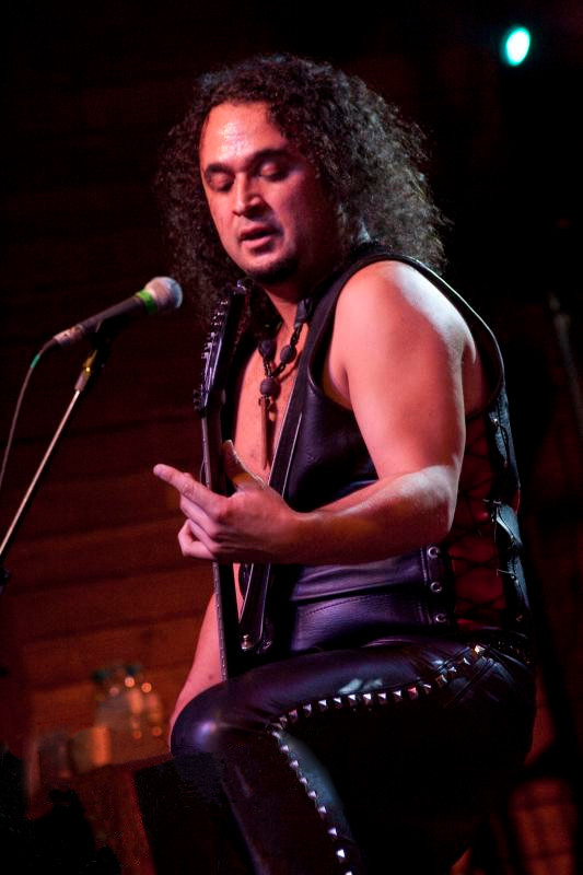 Halford Live @ Carioca Club - 24/10/2010 - São Paulo, Brasil É proibida a cópia ou reprodução deste material sem a autorização do autor. Por favor, não publique nada daqui sem o devido crédito. Fotógrafo: Alexandre Cardoso